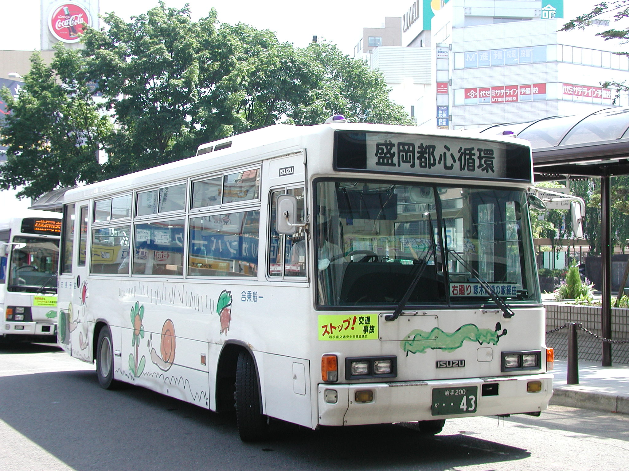 岩手県交通：でんでんむし右回り専用車両 盛岡駅東口にて （いすゞ・ジャーニーK：KC-LR333J・松園営業所所属）